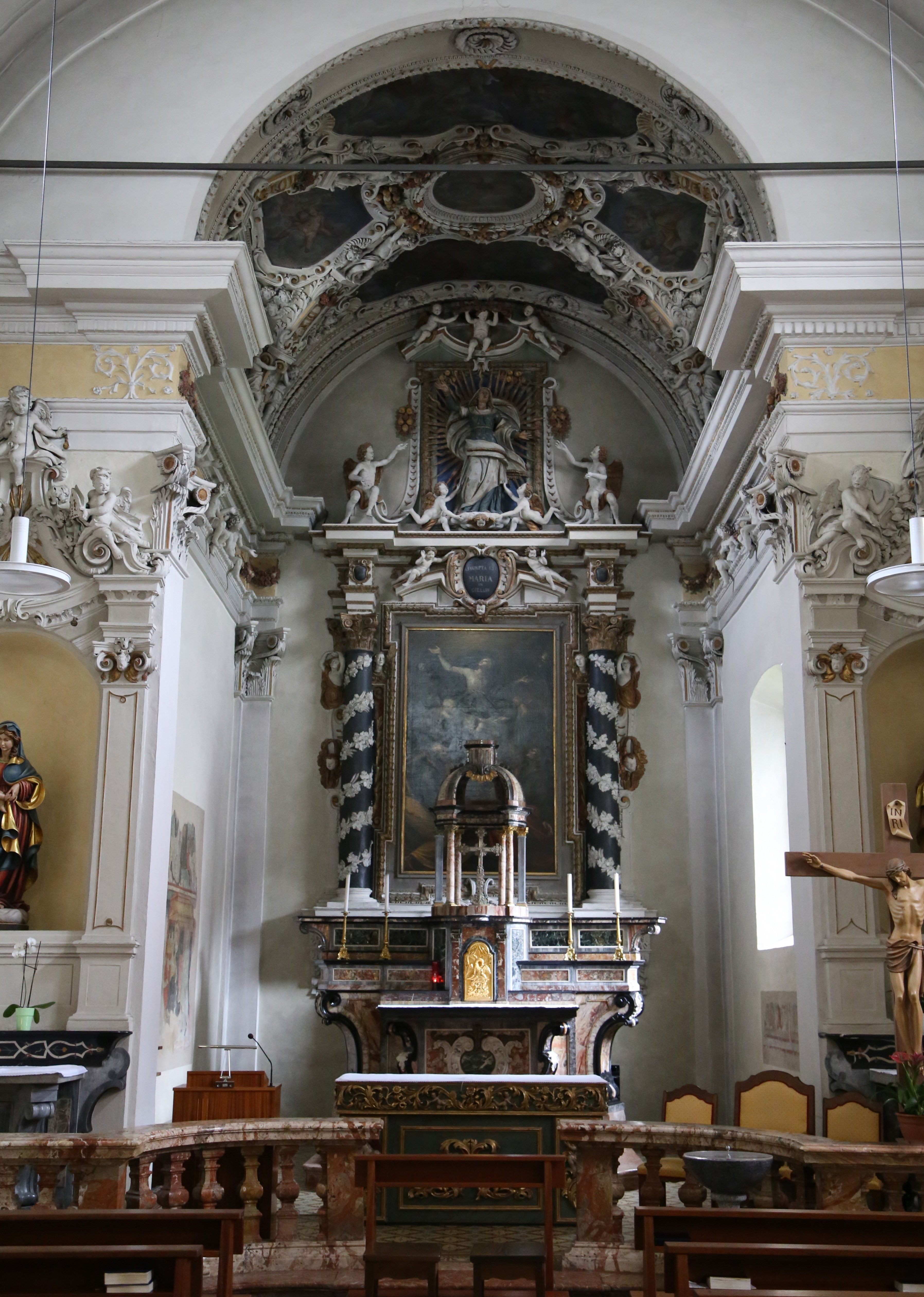 Santa Maria Assunta, Giubiasco, Tessin